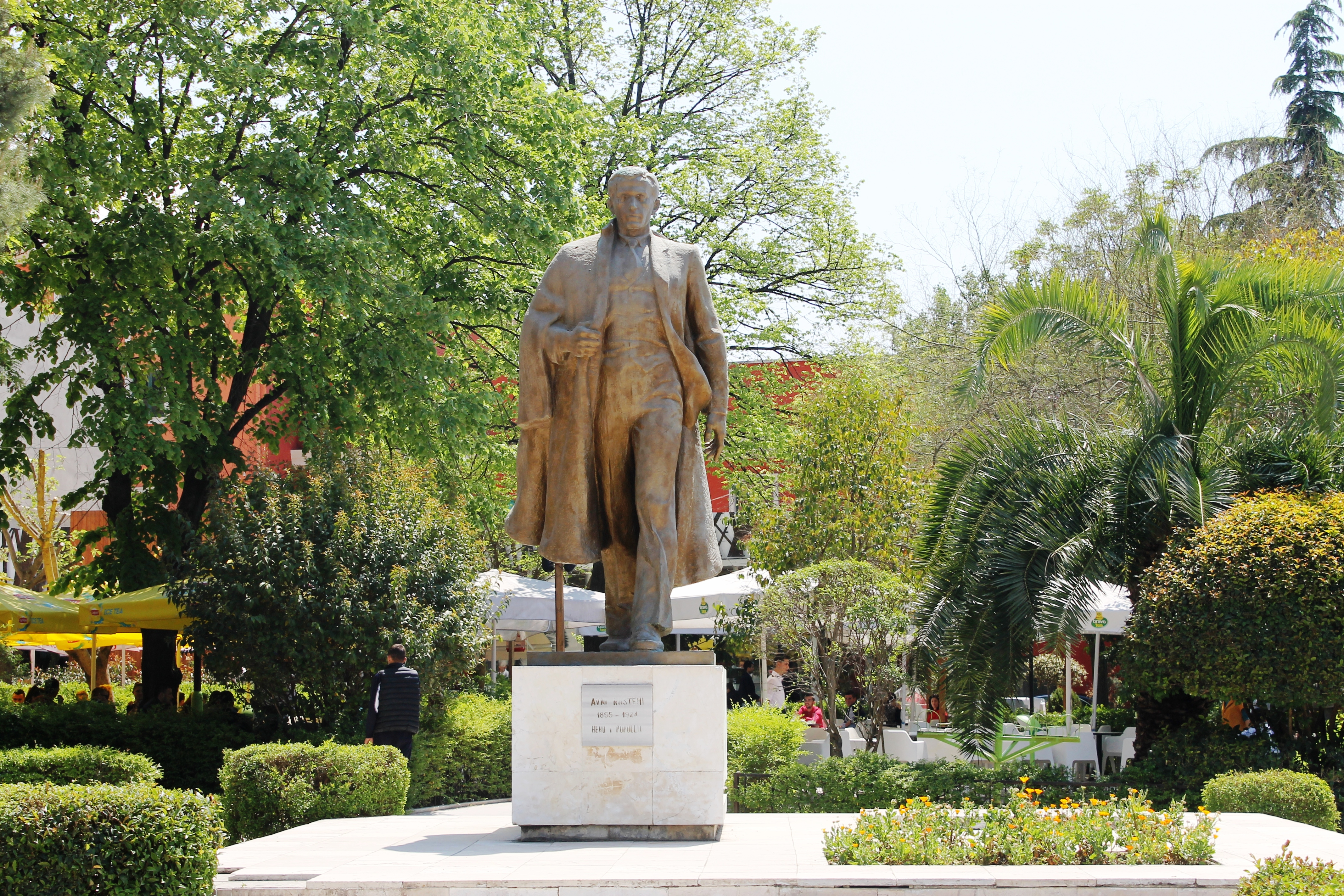 Shtatorja e Avni Rustemit në Vlore